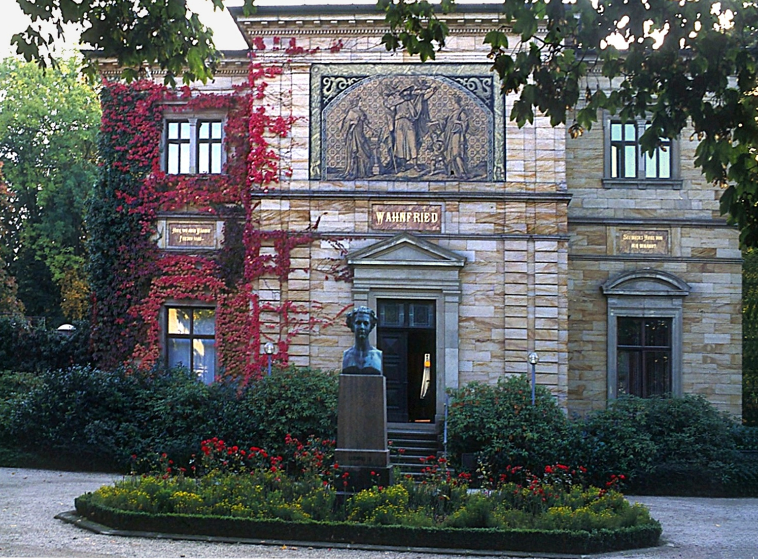 Haus Wahnfried in Bayreuth, Nordostseite